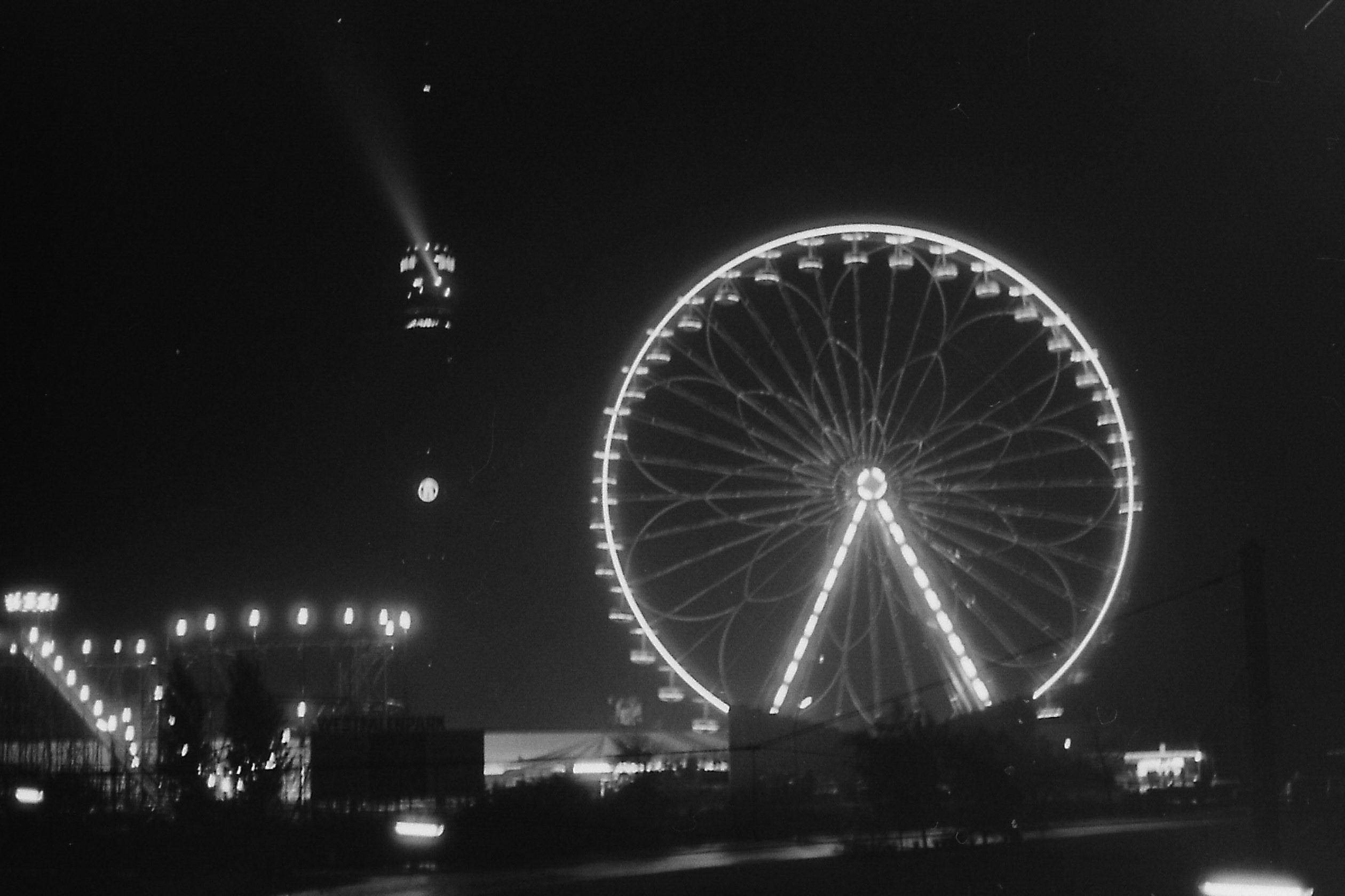 Deutschland (D) - Nordrhein-Westfalen (NW) - Dortmund: Bundesgartenschau 1969, Riesenrad